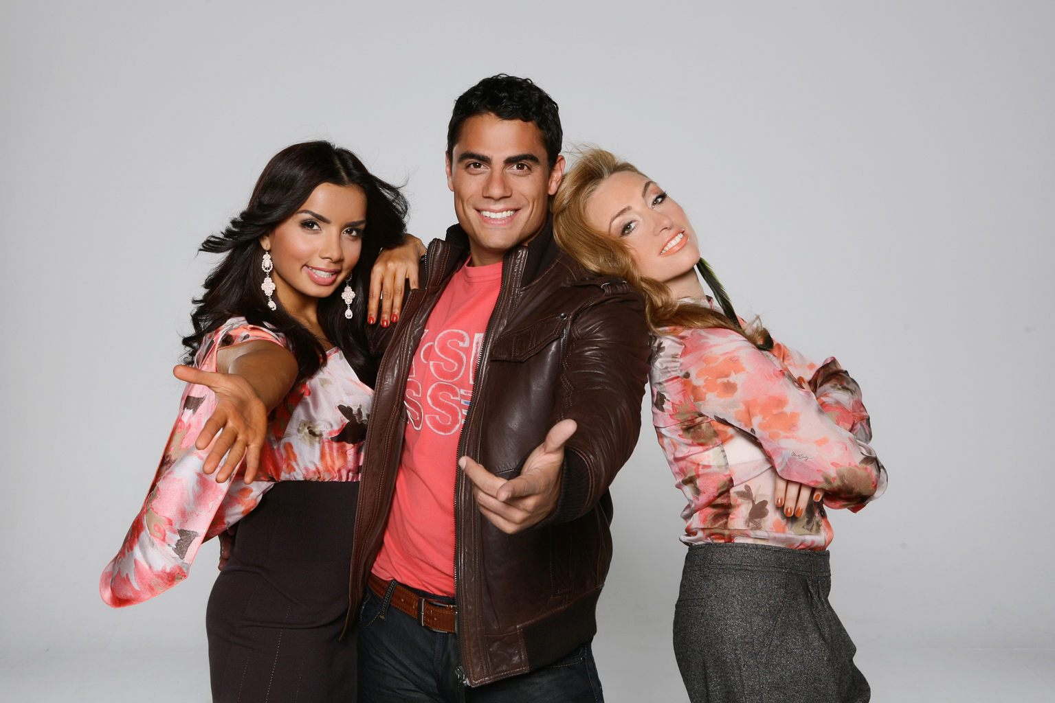 Hot Banditoz in der seit 2011 aktiven Musikerkonstellation mit v. l.: Diba Hakimi, Silva Gonzalez und Gabriela Gottschalk